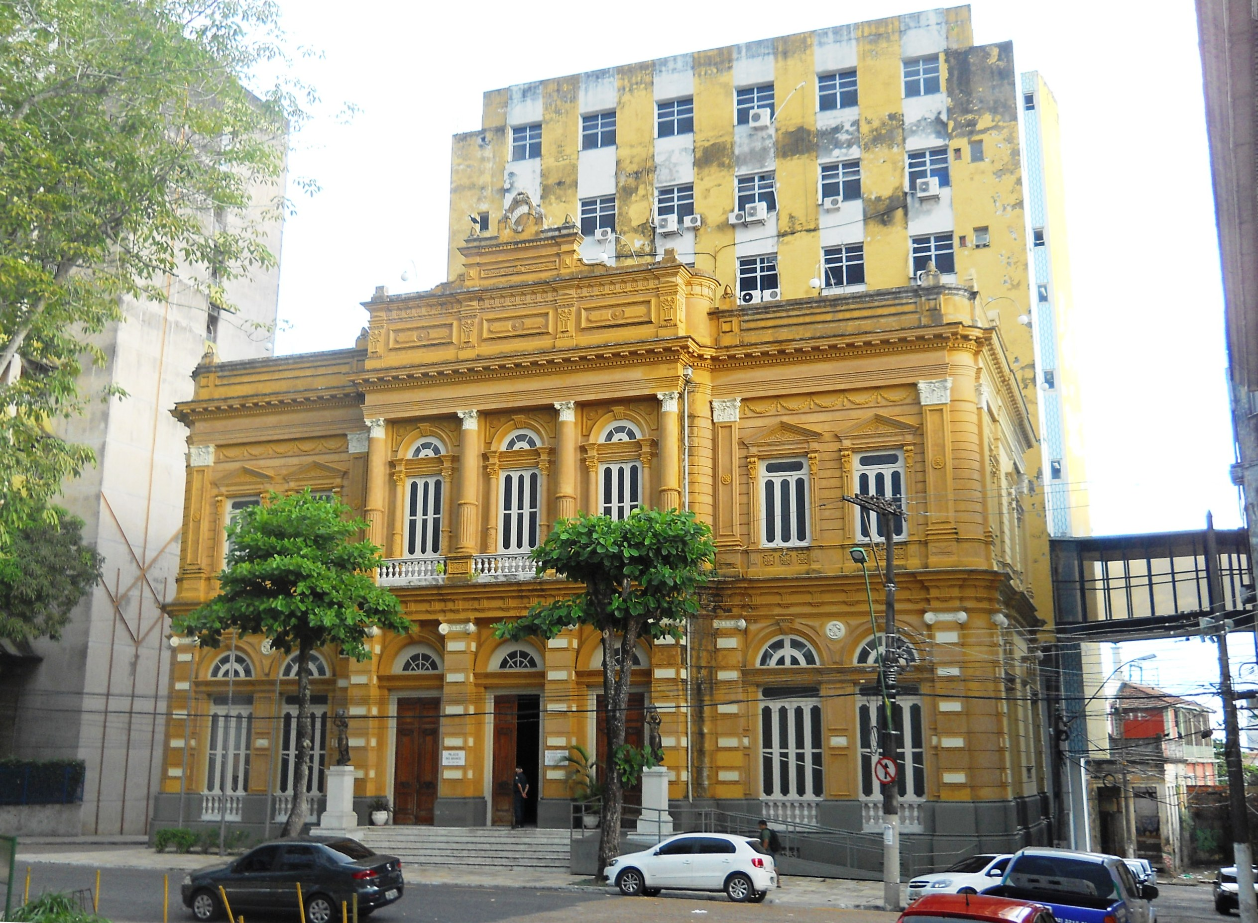 Centro Histórico de Manaus